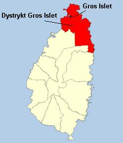 Mapka pokazująca położenie miasta Gros Islet na terenie dystryktu Gros Islet.